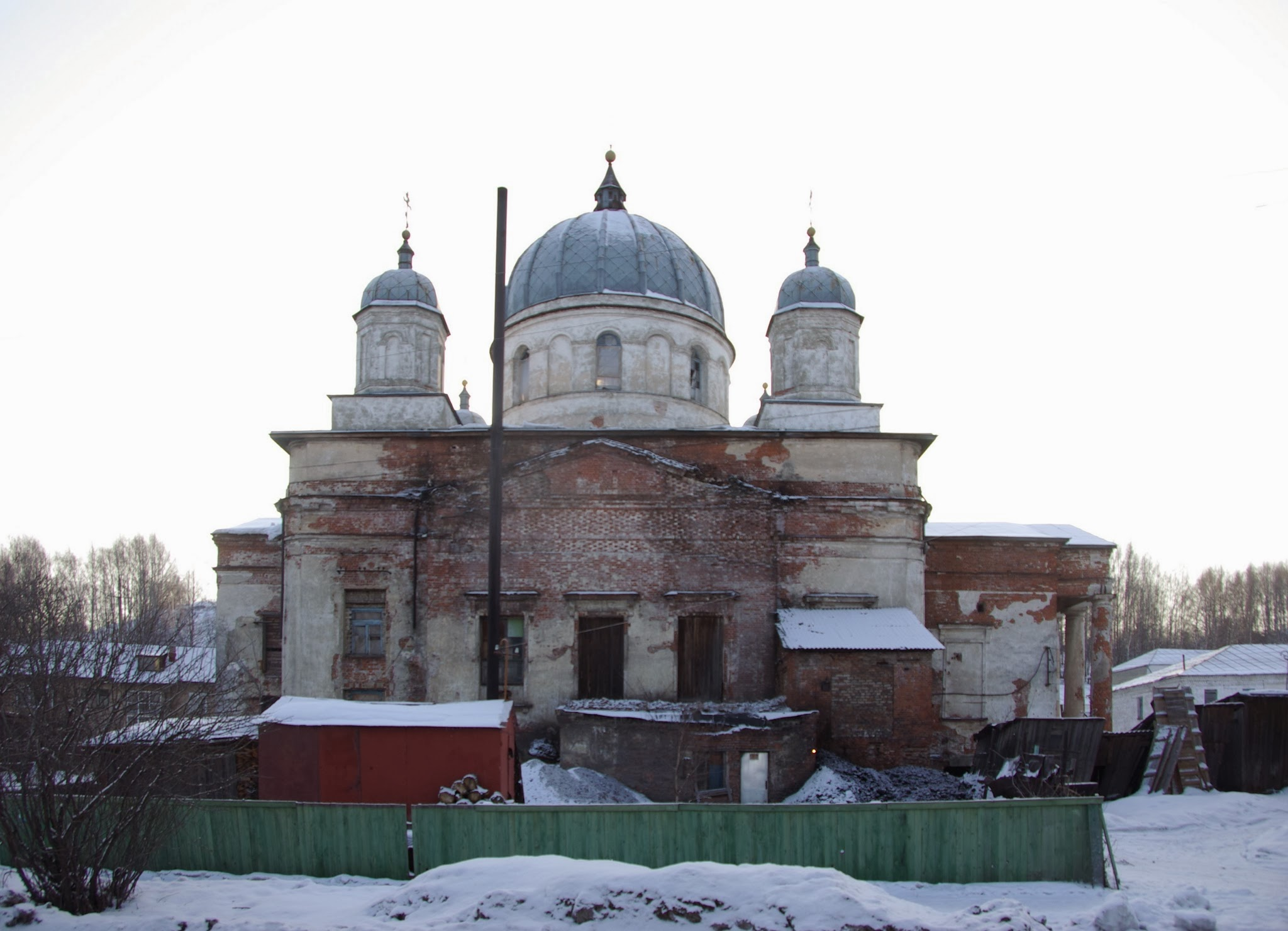 Galich, Kostromskaya oblast', Russia